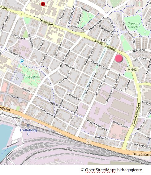 Röd prick markerar platsen för Trelleborgs glasindustri 1919-1957